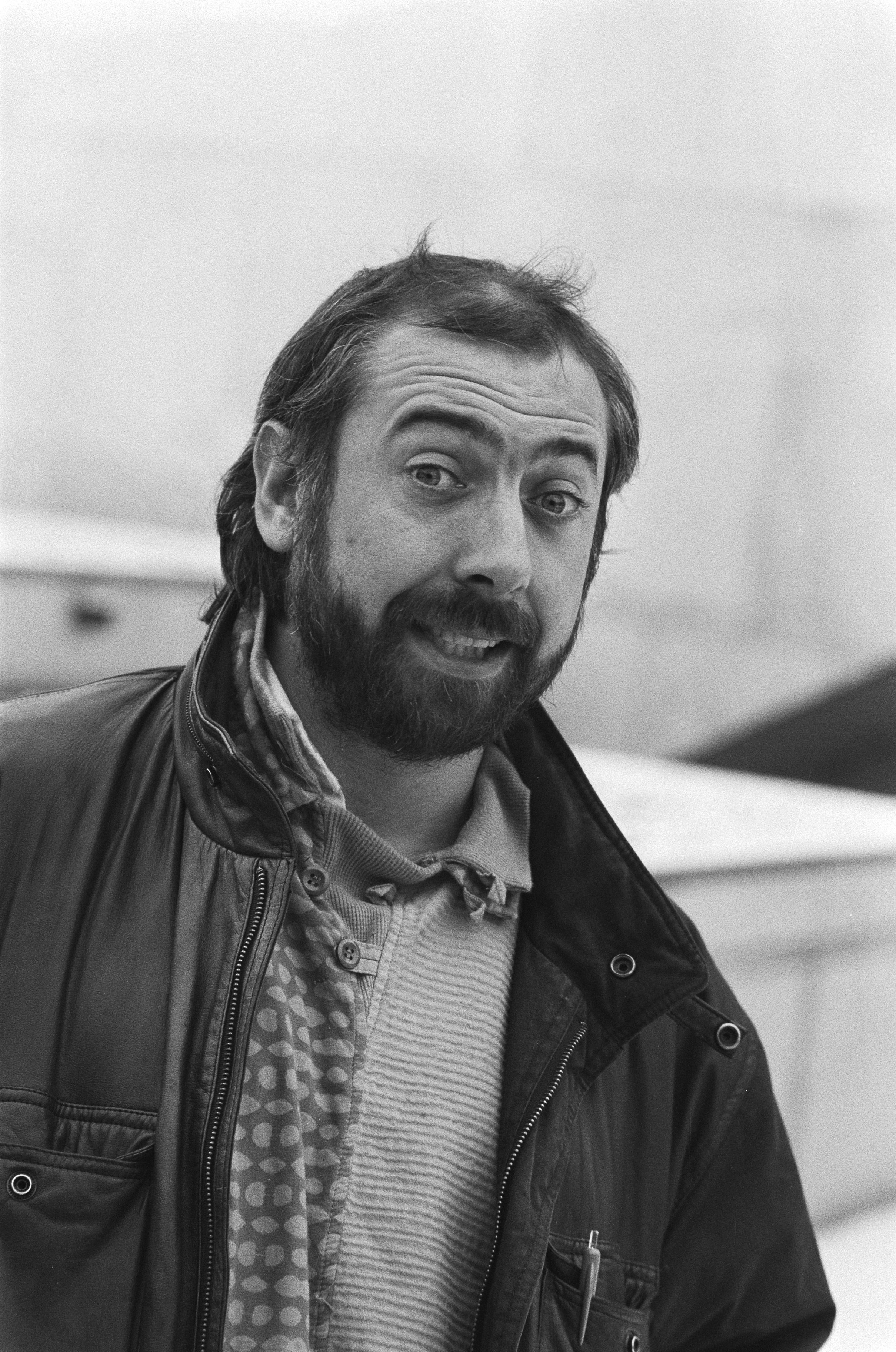 Collectie / Archief : Fotocollectie Anefo Reportage / Serie : Urbanus verlaat het NOS-gebouw met de zojuist ontvangen gouden plaat Beschrijving : Portret van Urbanus Datum : 30 december 1985 Trefwoorden : artiesten, portretten Persoonsnaam : Servranckx, Urbain , Urbanus Fotograaf : Bogaerts, Rob / Anefo, [onbekend] Auteursrechthebbende : Nationaal Archief Materiaalsoort : Negatief (zwart/wit) Nummer archiefinventaris : bekijk toegang 2.24.01.05 Bestanddeelnummer : 933-5242